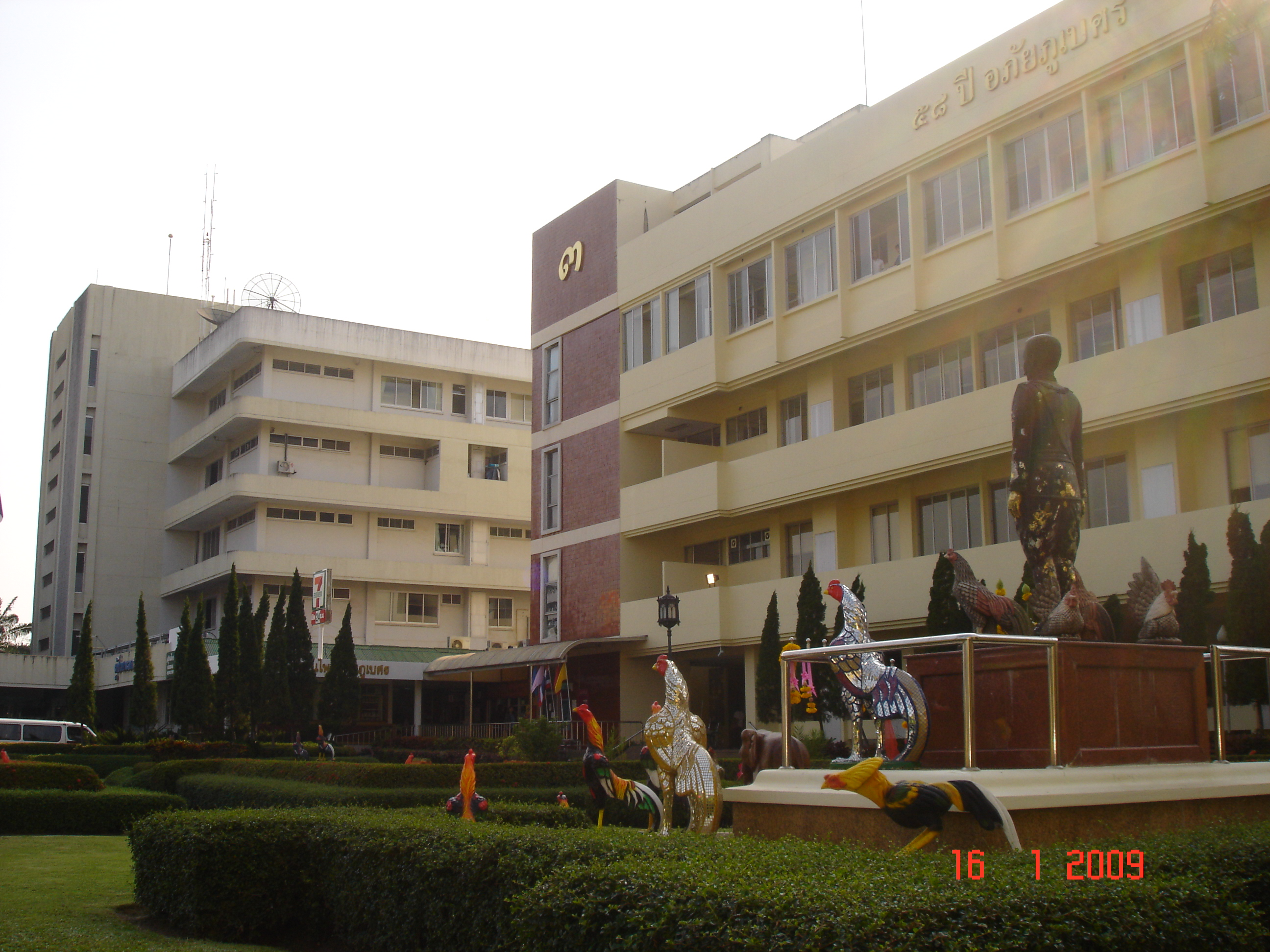 โรงพยาบาลเจ้าพระยาอภัยภูเบศร (Chaophraya Abhaibhubejhr Hospital)